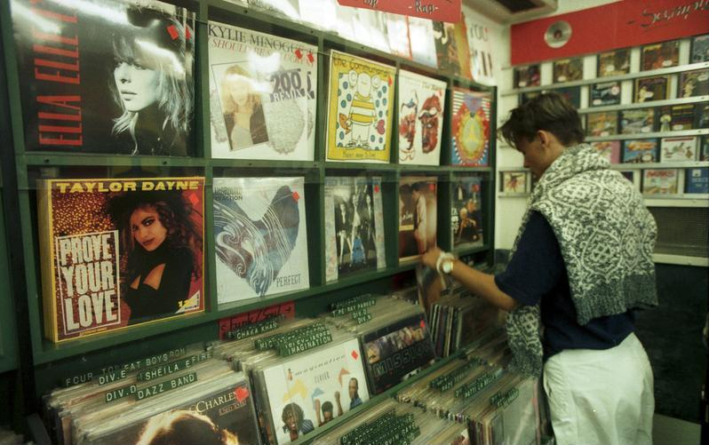 Juni 1988 Bonn - Innenstadt, Schallplattengeschäft in der Sternstraße